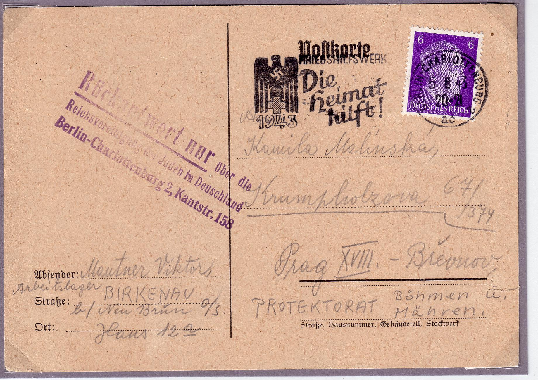 Postkarte eines Häftling aus dem KZ Auschwitz-Birkenau von 1943. Poststempel: "Berlin-Charlottenburg 2, 5.8.1943"